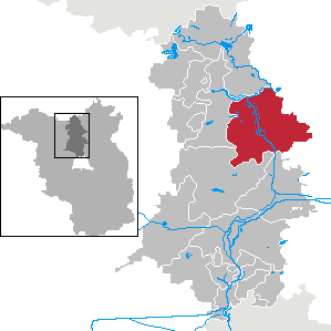 Zehdenick in Brandenburg (Country) - District Oberhavel